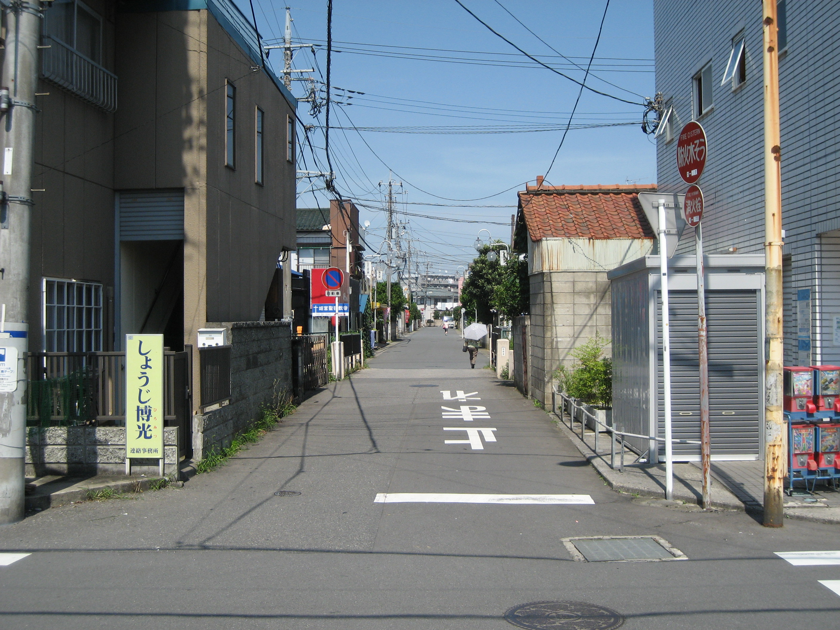 埼玉県道４０6号線宮代町内姫宮駅東口付近を撮影